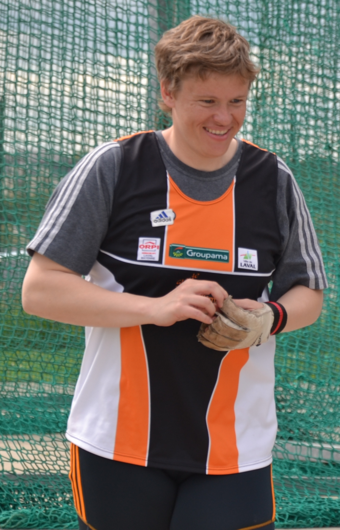 Manuela Montebrun au 1er tour des interclubs disputés à Laval le 5 mai 2013